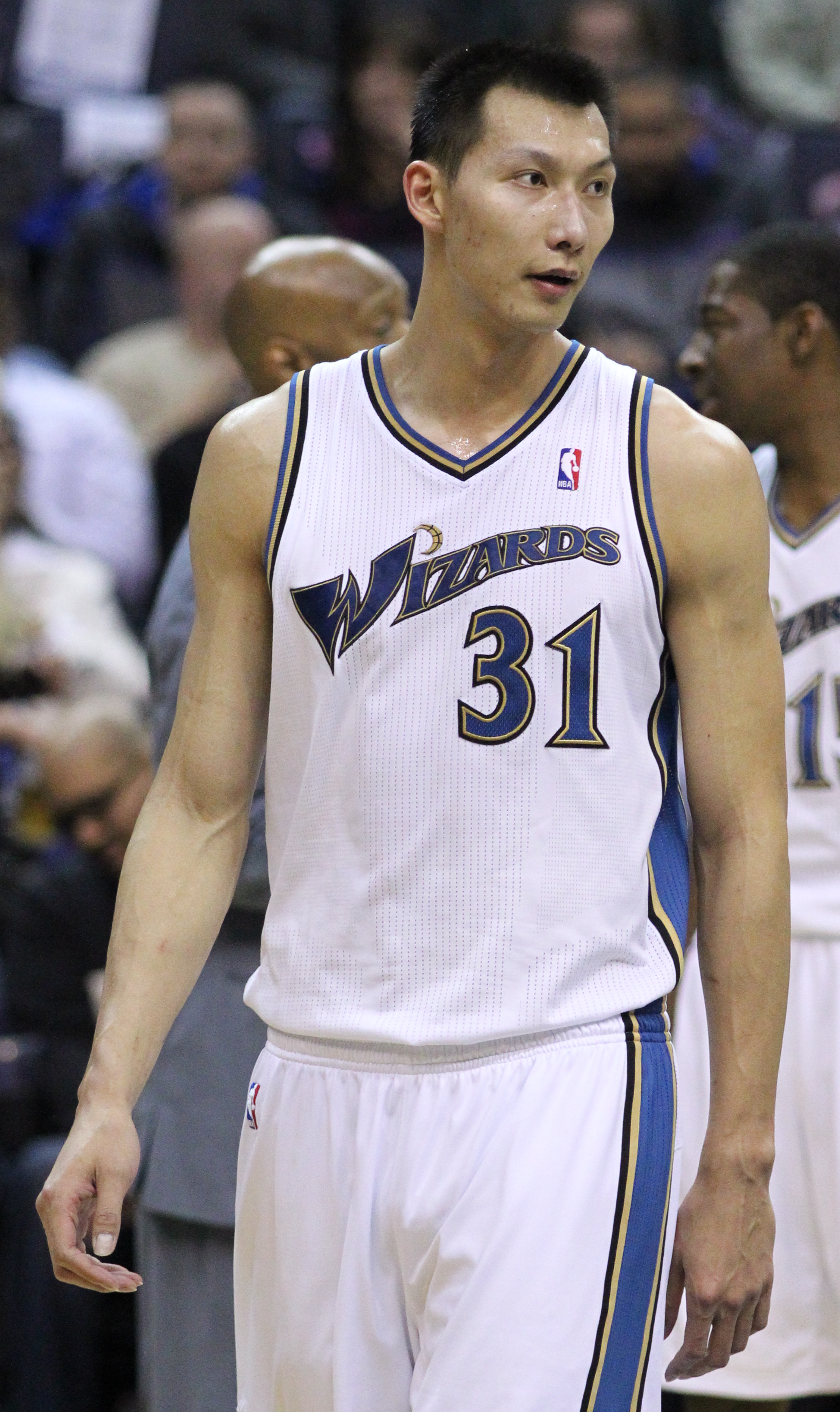 Wizards v/s Thunder 03/14/11 Wizards v/s Thunder 03/14/11